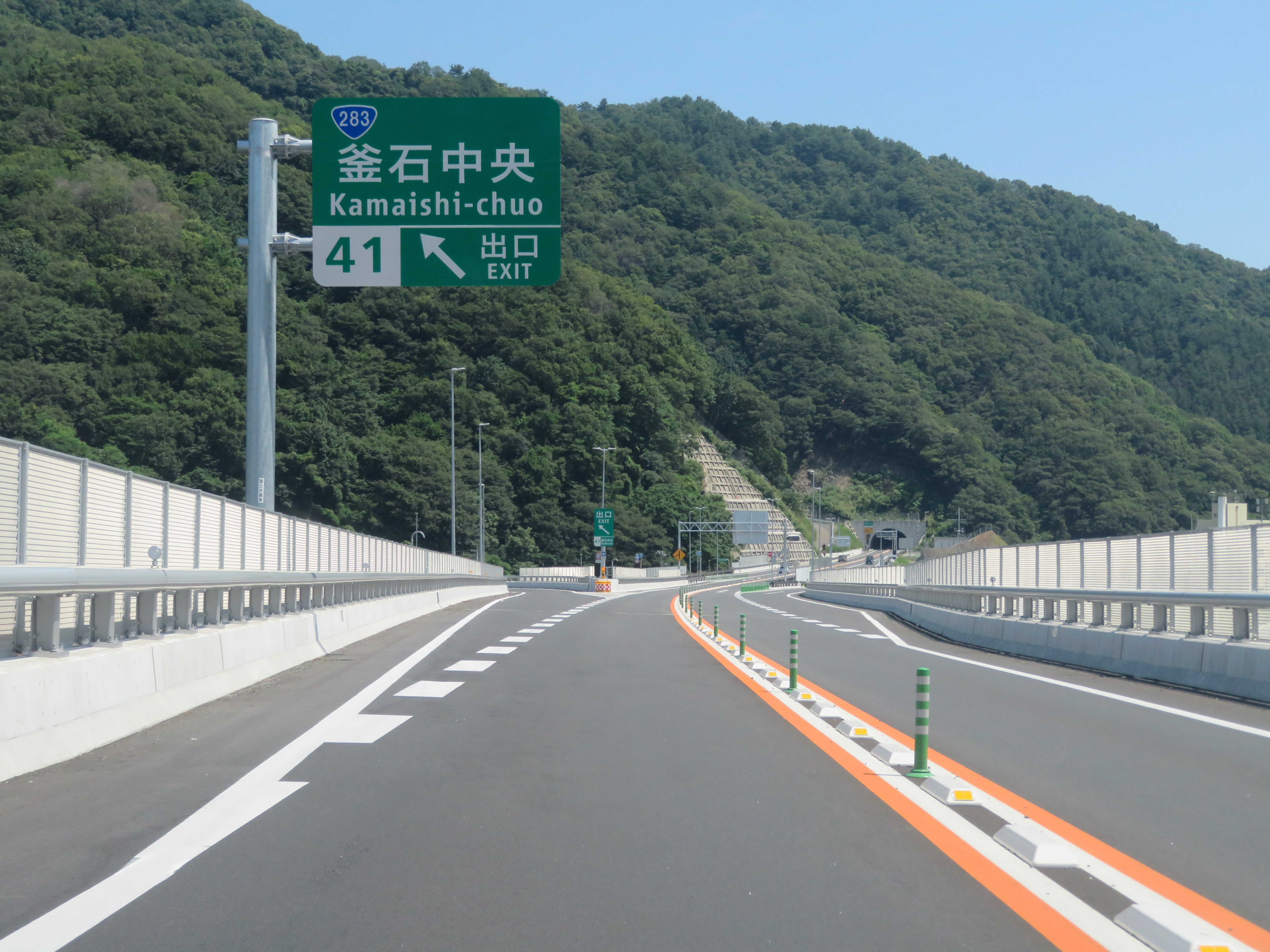 三陸自動車道釜石中央ＩＣ出入口付近（釜石ＪＣＴ方面側から撮影）